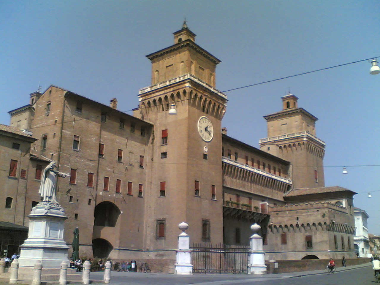 Estense Castle, Ferrara